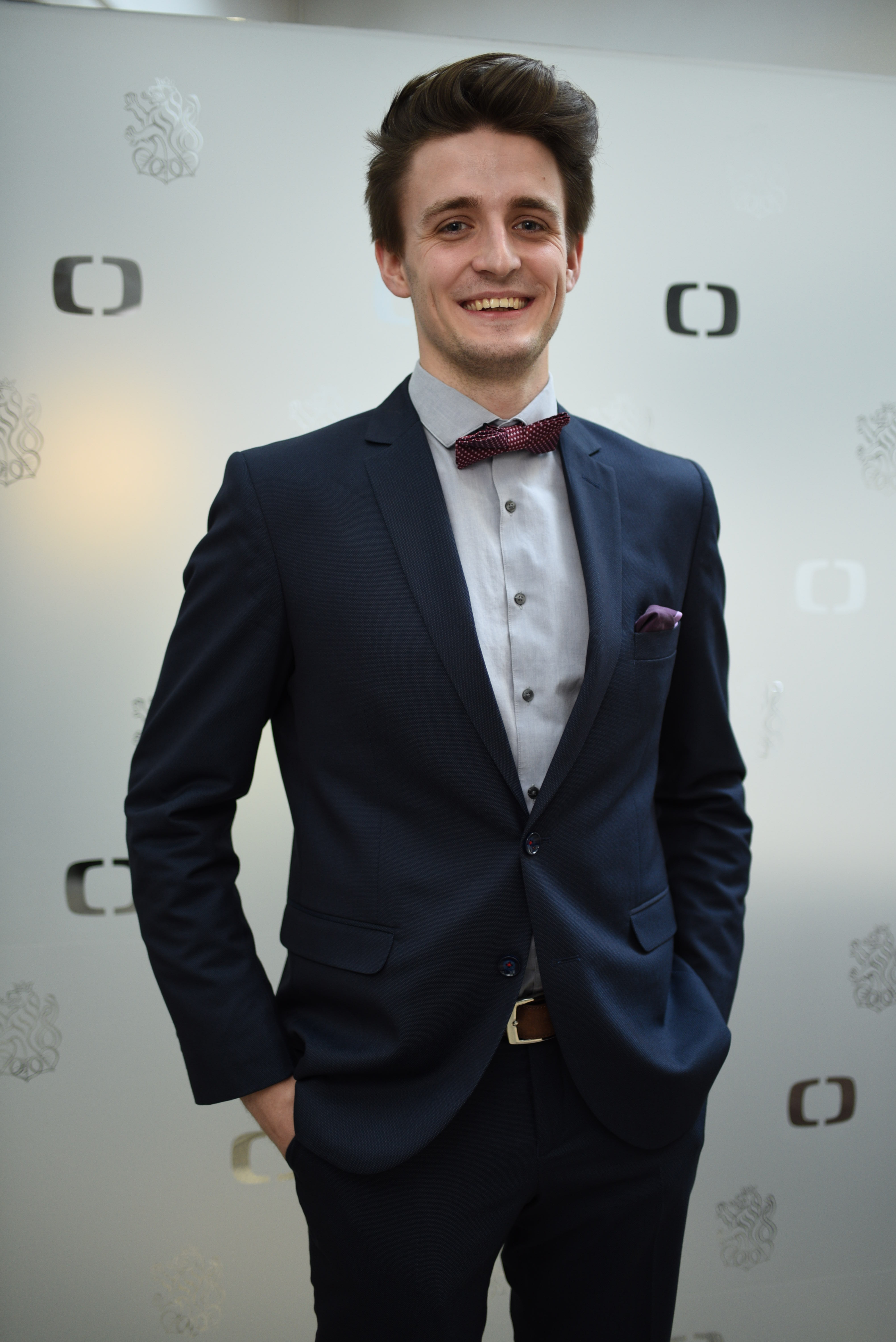 Štěpán Slovák